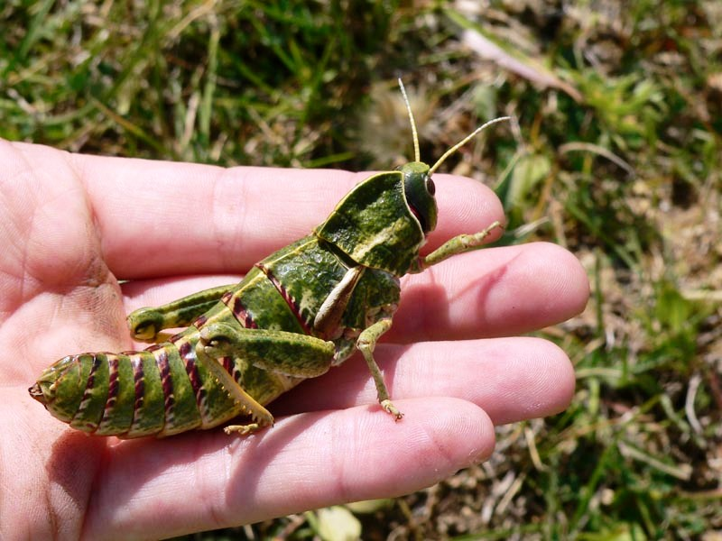 Pamphagus marmoratusSerre della Pizzuta (Palermo, Italy)